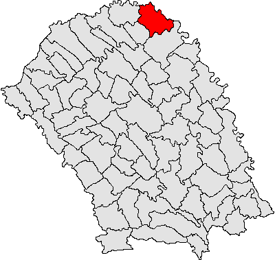 Categorie:Hărţi ale judeţului Botoşani